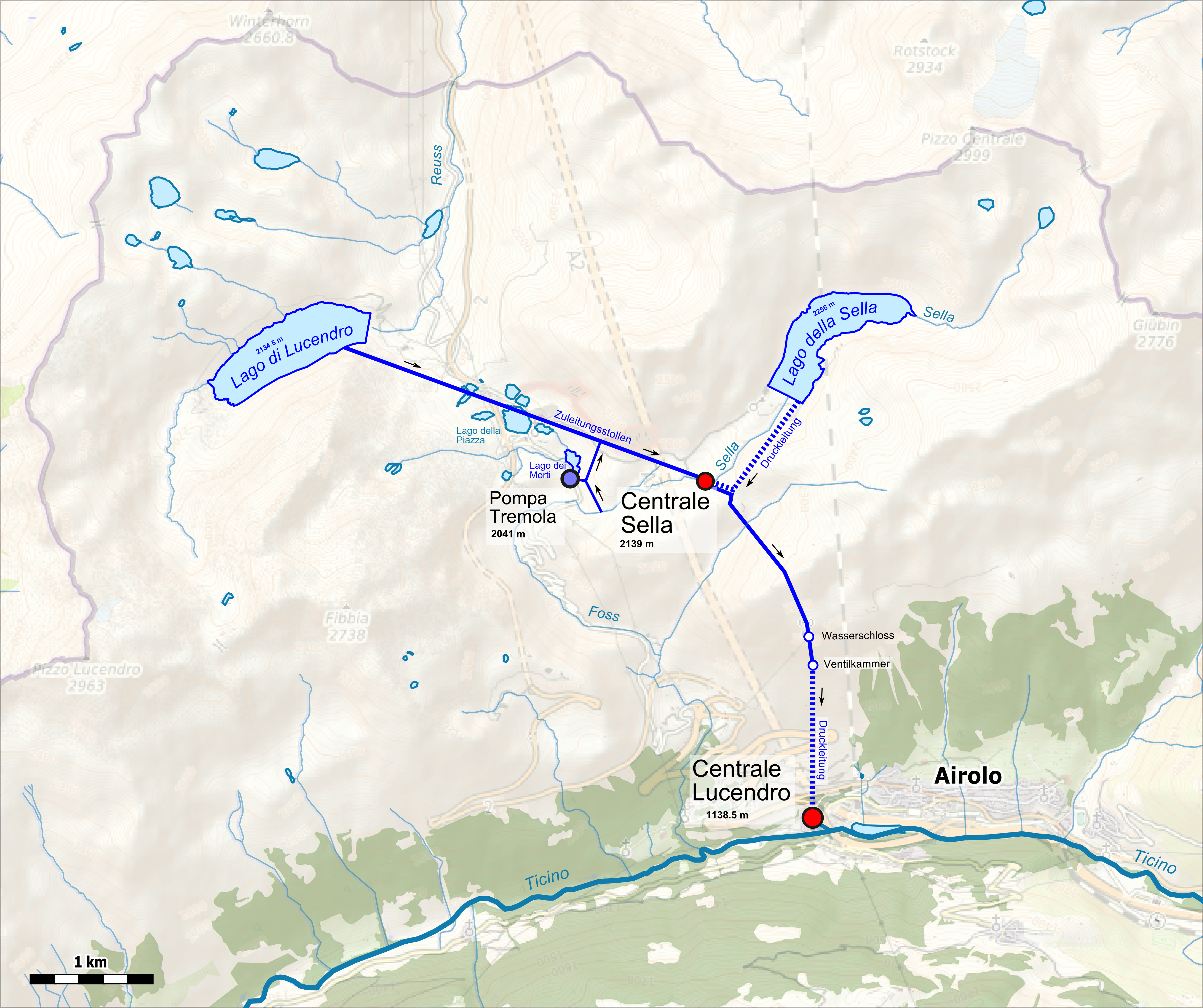 Lagekarte des Kraftwerks Lucendro